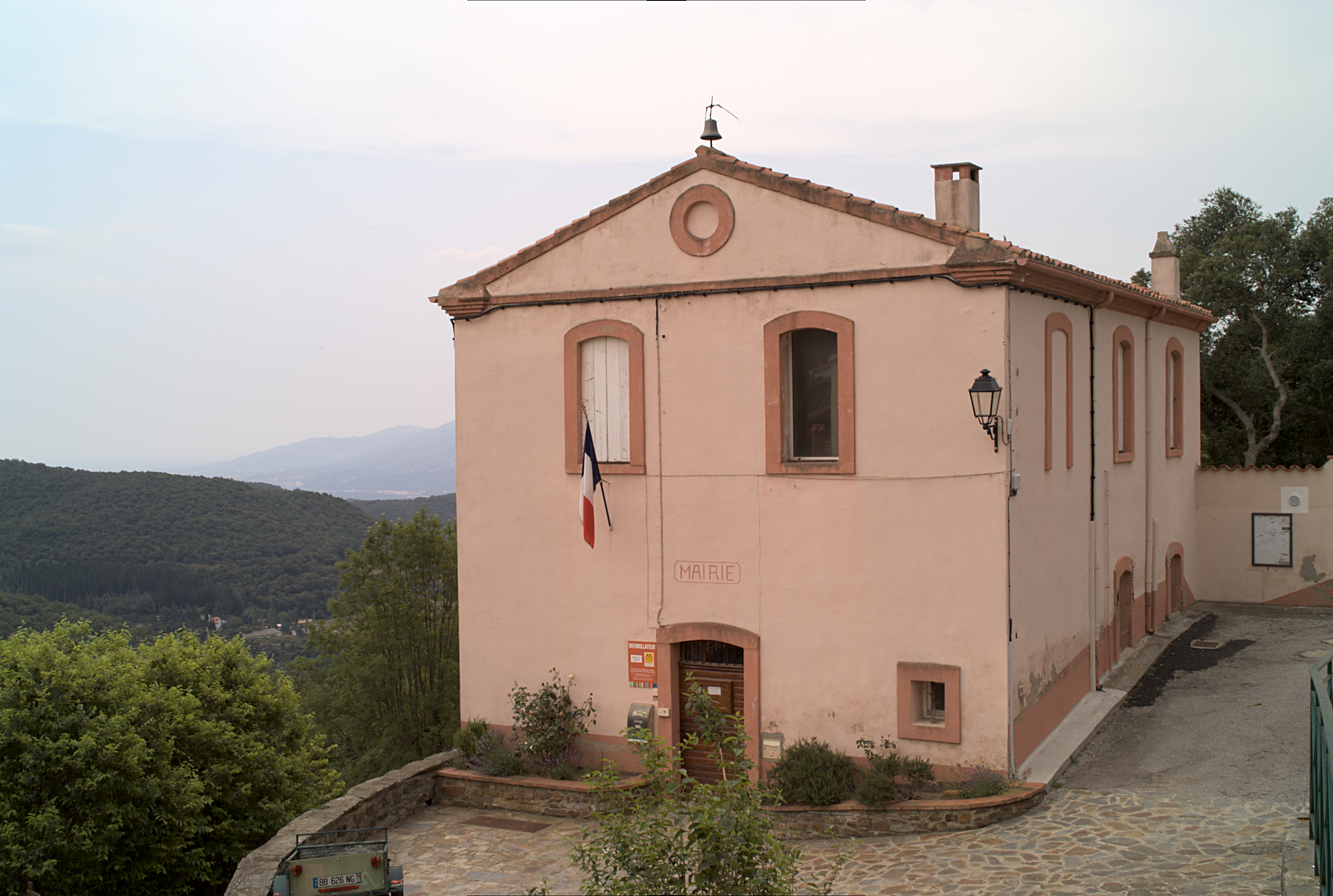 Mairie, Taillet (Pyrénées-Orientales, Languedoc-Roussillon, France)